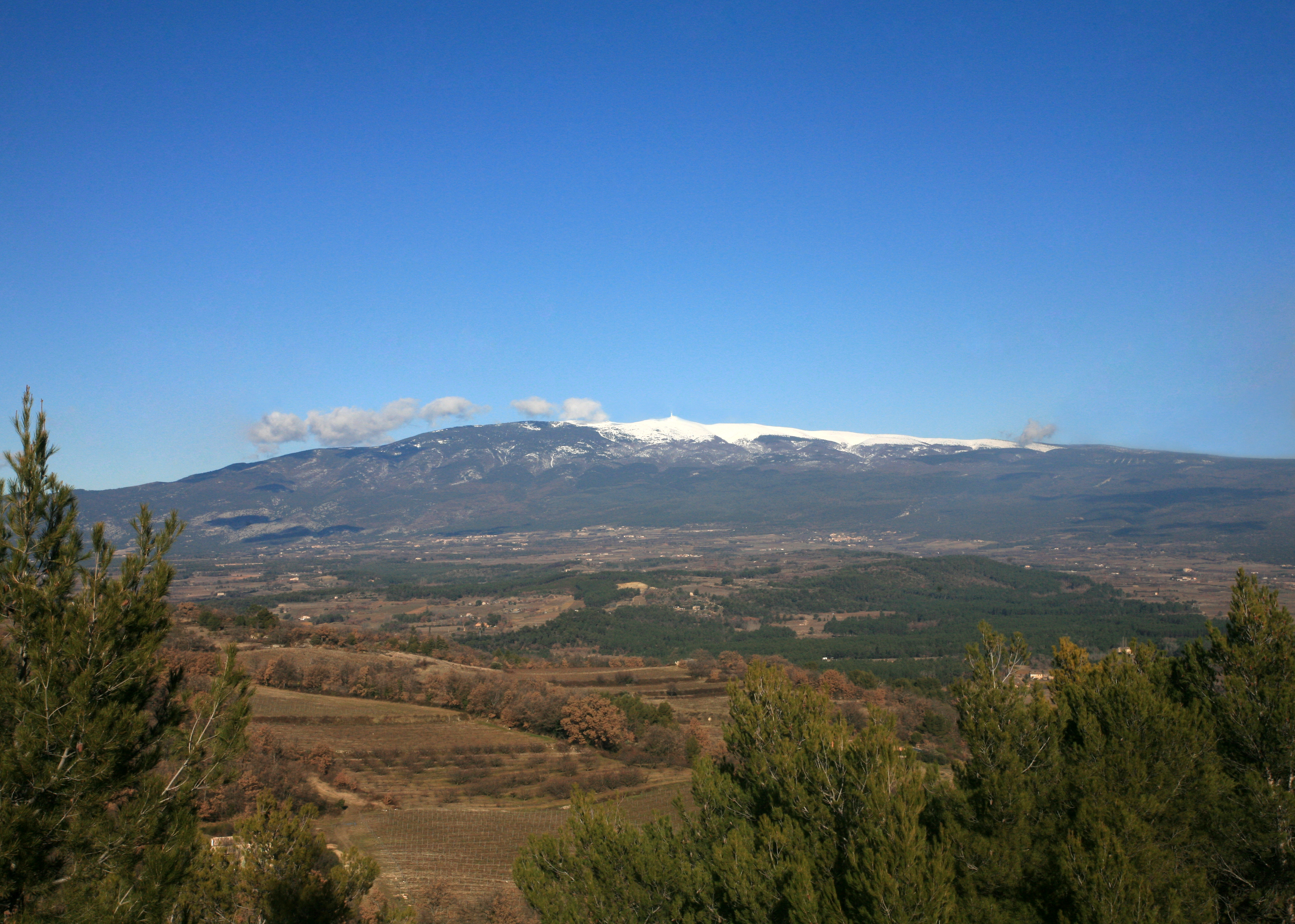 Le Mont Ventoux, France